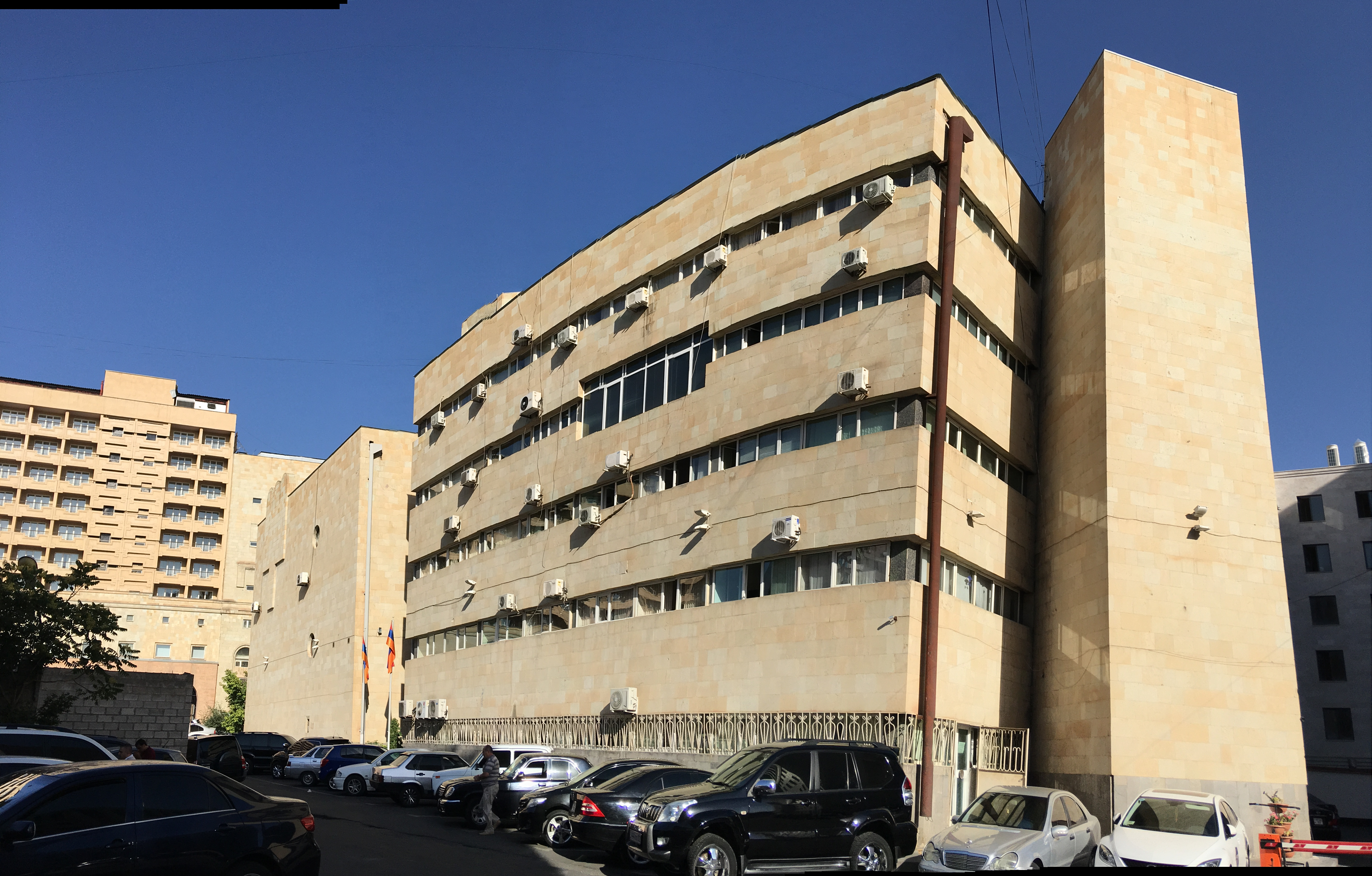 Հայաստանի Հանրապետության Վճռաբեկ դատարան, Երևան, Հայաստան